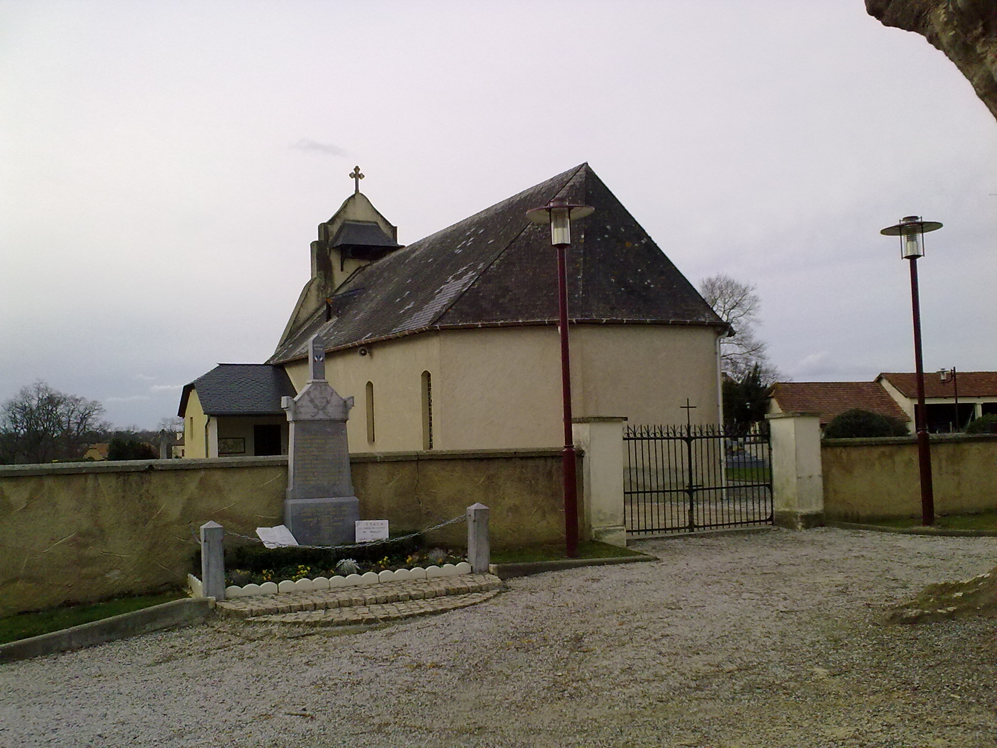 Eglise de Higuerres